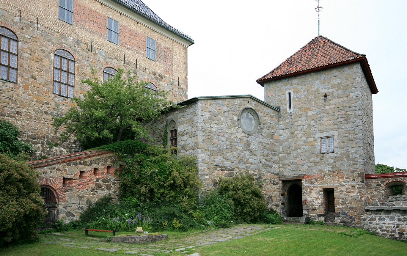 Akershus festning, Oslo. I midten Det kongelige mausoleum, bygd 1948. Til venstre geværgalleri fra 1774. Til høyre Jomfrutårnet.